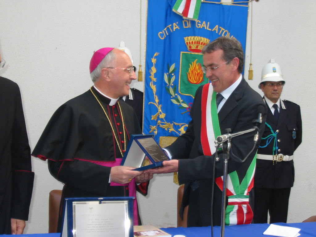 Consegna della Cittadinanza onoraria del comune di Galatone a Mons. Fernando Filoni